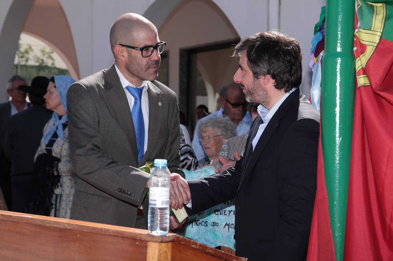 Na inauguração da nova sede da Junta de Freguesia de Montenegro com a presença do Sec. Estado Pedro Lomba